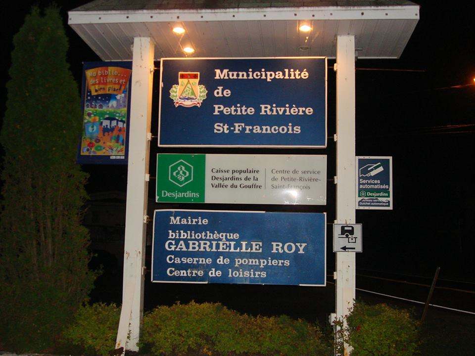 Aviso del ayuntamiento de Petite-Rivière-Saint-François.